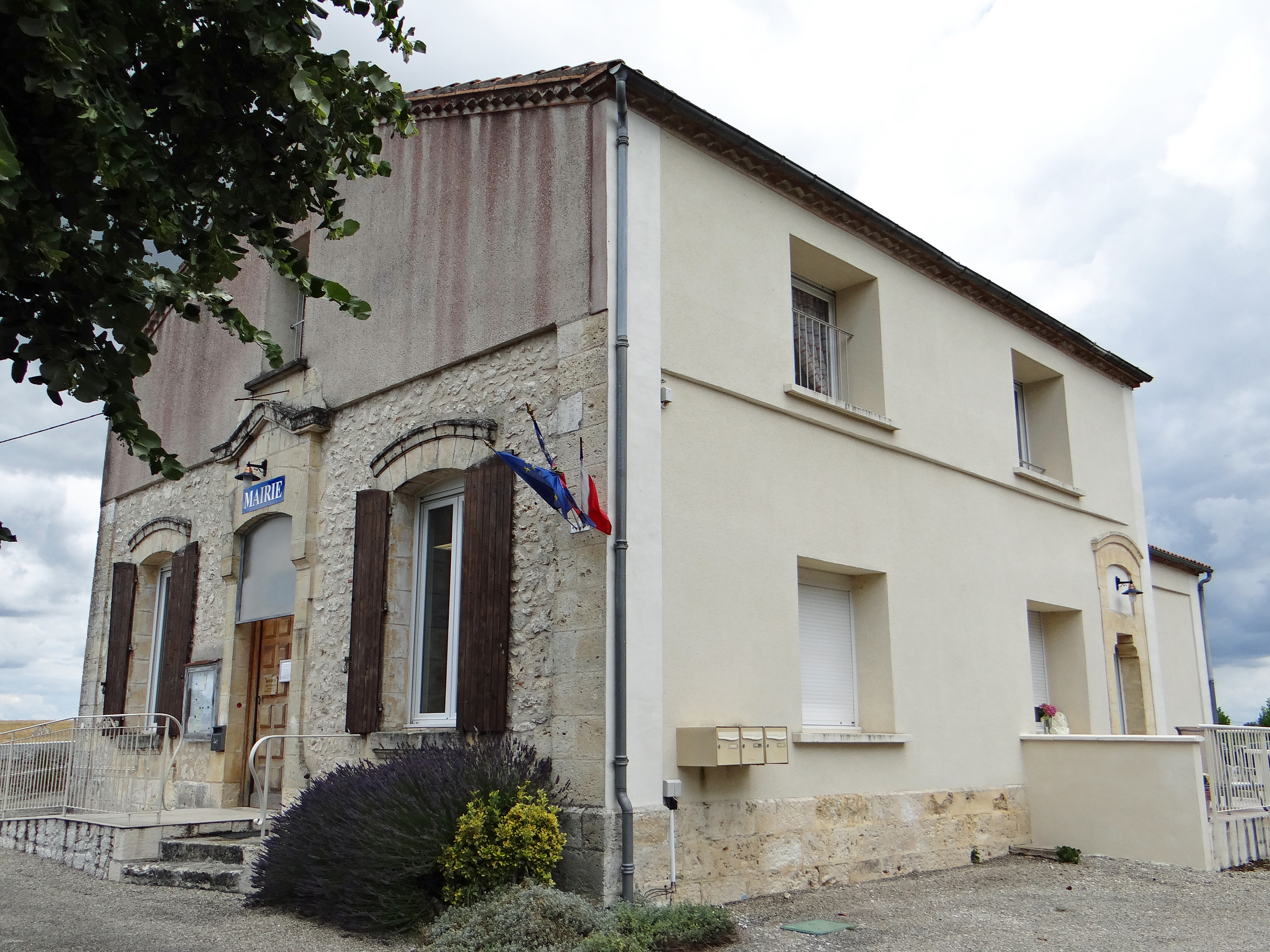 Blaymont - Mairie